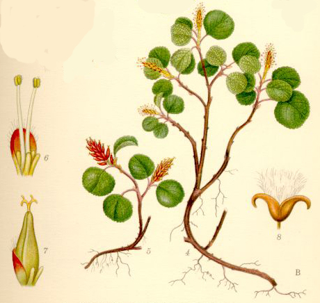 Dvärgvide (Salix herbacea)